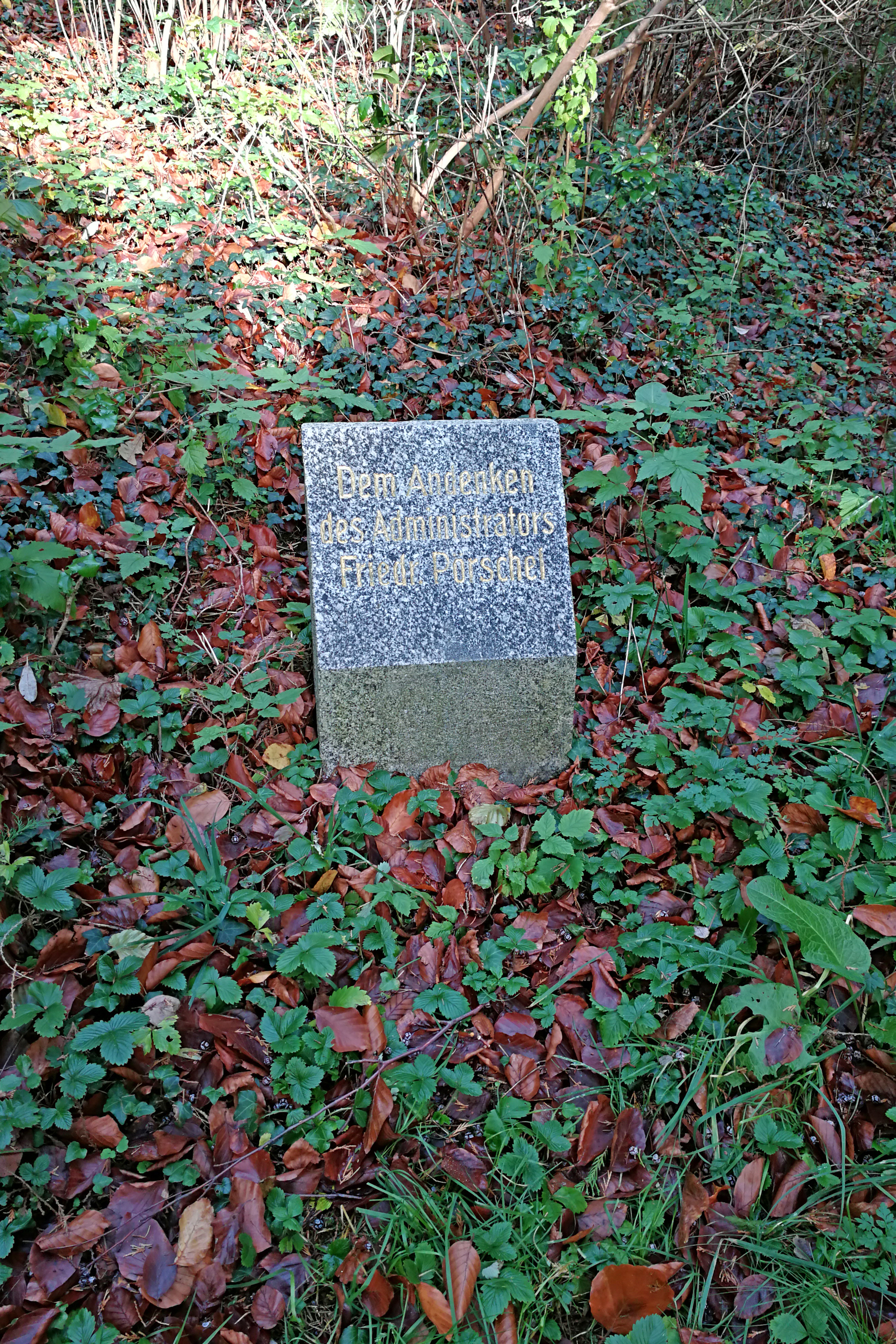 Kamenz, Hutberg, Gedenkstein für den Administrator (Gutsverwalter) des Dorfes Spittel (heute zu Kamenz) Friedrich Gottlob Pörschel (geboren 1819)